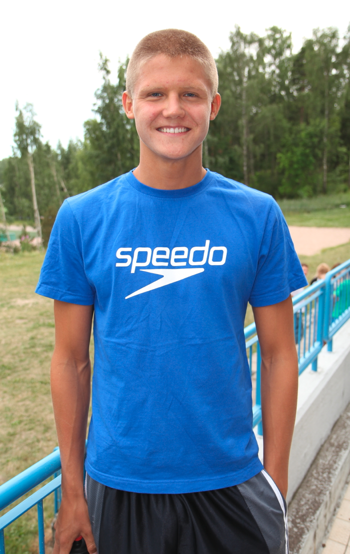 Matias Koski, Uinnin SM kisat Espoo 2011 Kuvaaja: Mika Ruusunen